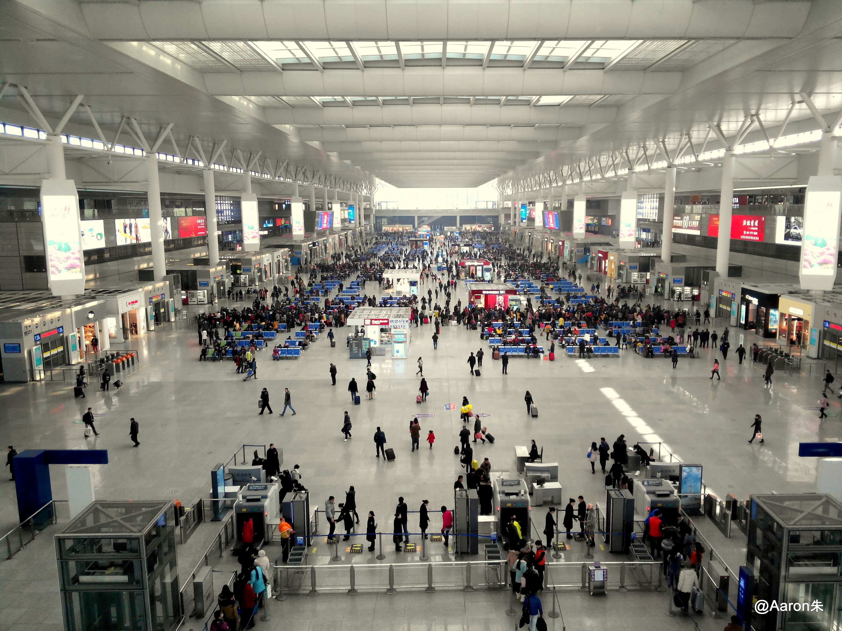 Shanghai Hongqiao Railway Station 上海虹桥高铁站